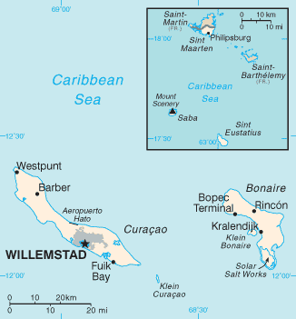 Mapa Antillas Neerlandesas